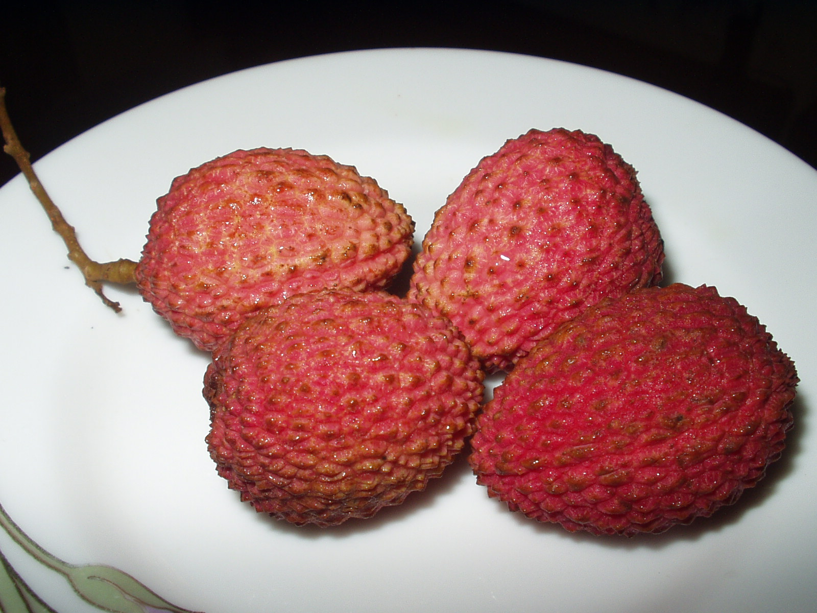 litchi or lichu a local fruit. Mamun2a 06:01, 23 August 2006 (UTC)